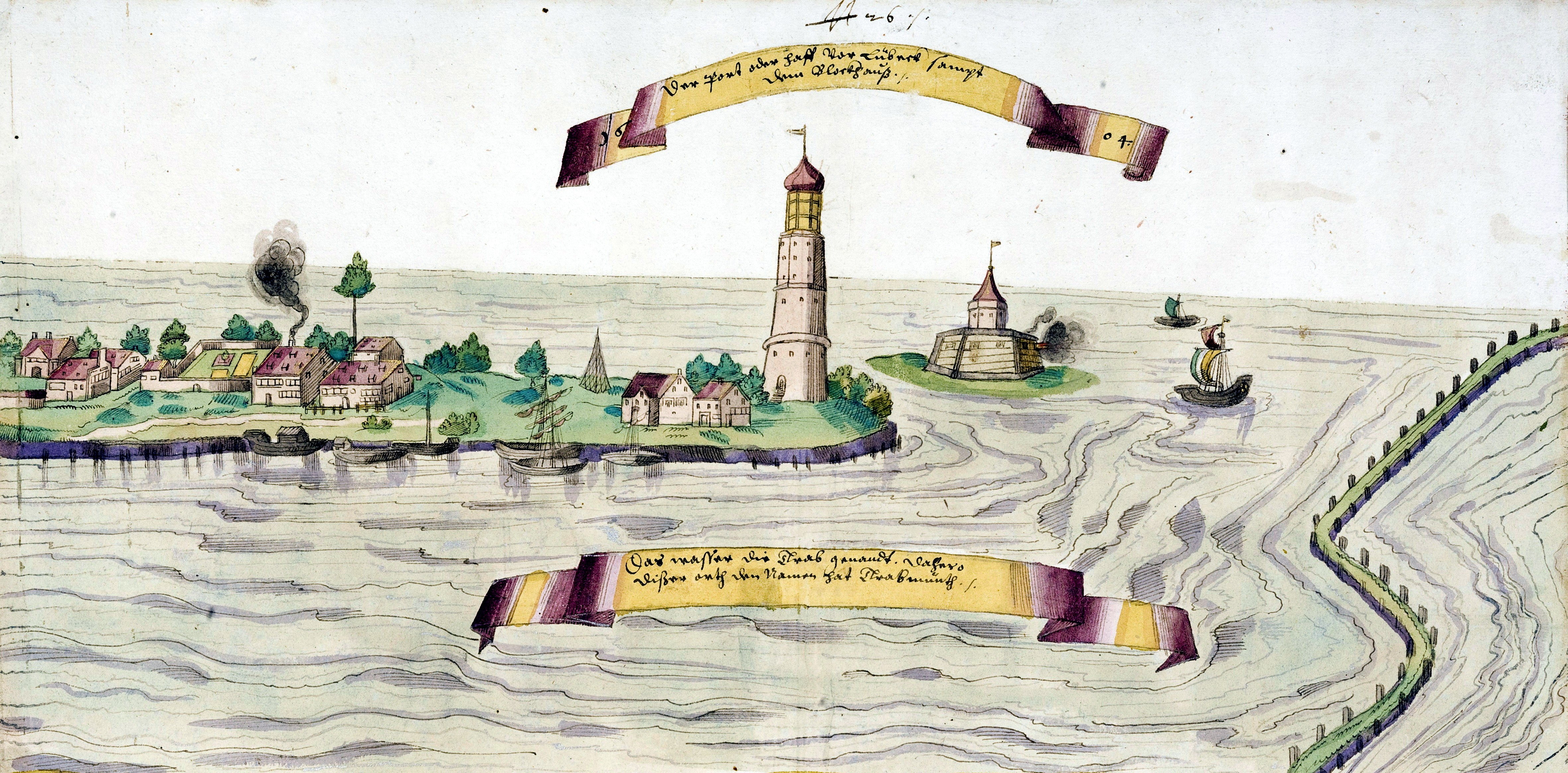 Travemünde, Ansicht der Halbinsel mit Leuchtturm und Blockhaus zur Kontrolle der Travemündung